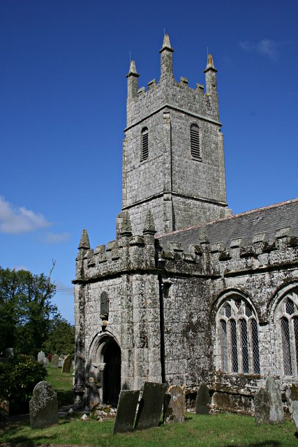 St Enoder Church